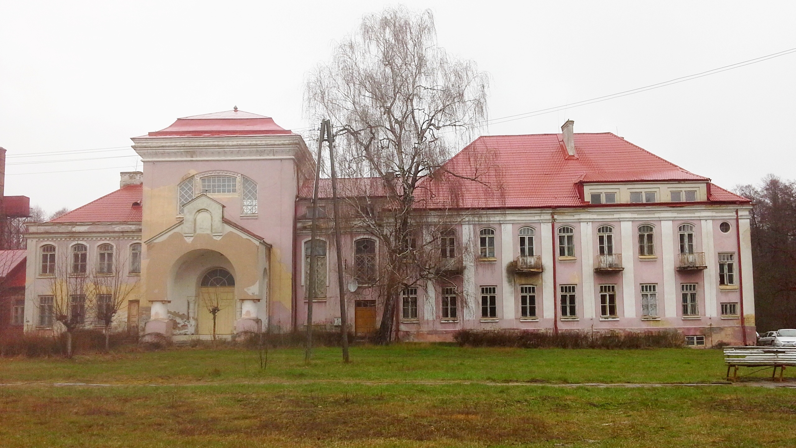 Dawny budynek monasterski w Turkowicach